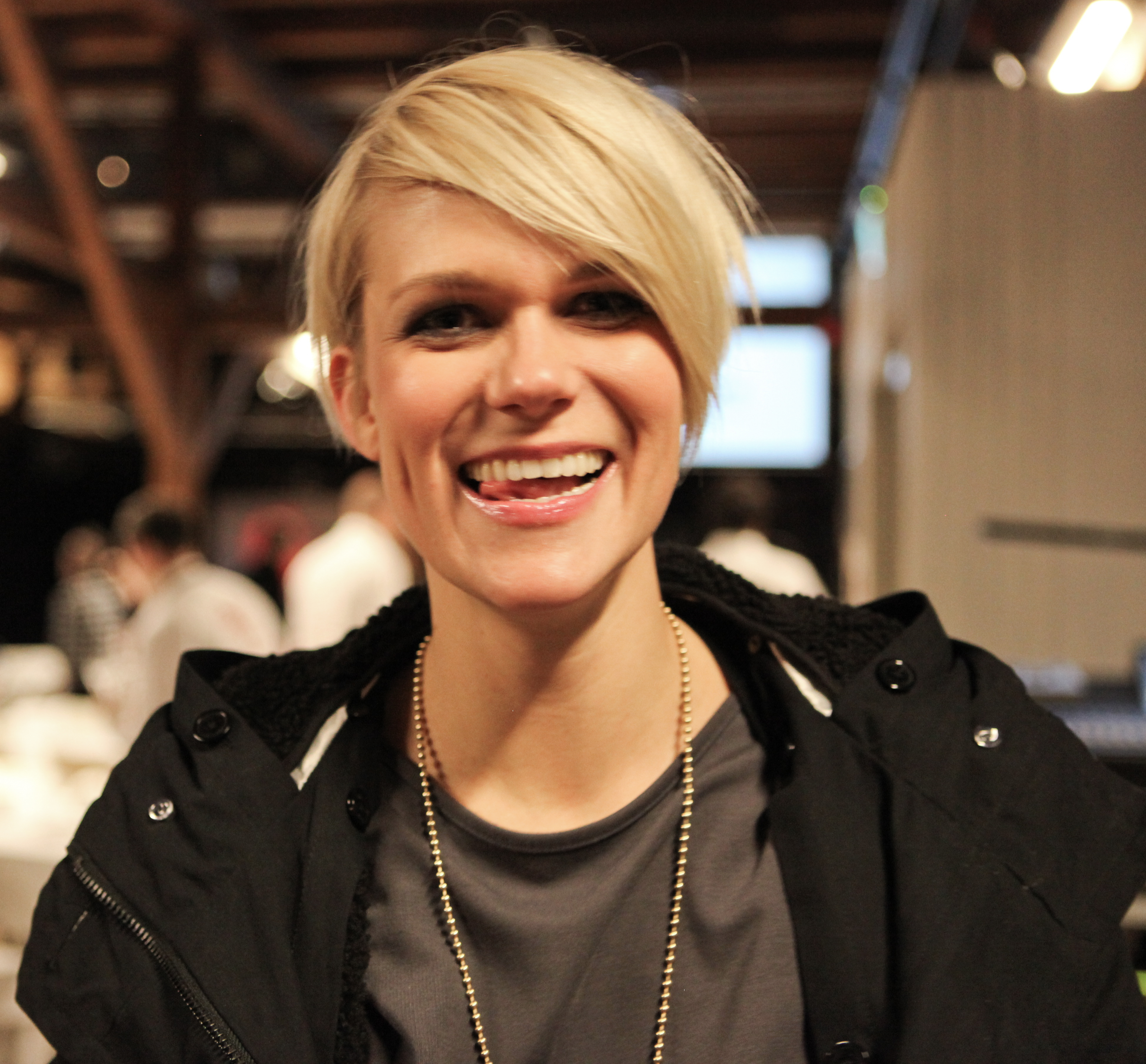 Konferansier Sigrid Bonde Tusvik